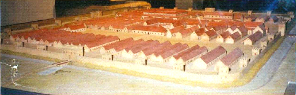 Modell des LL Lauriacum im 3. Jhdt.n.Chr. im RM Enns, Ansicht aus SO